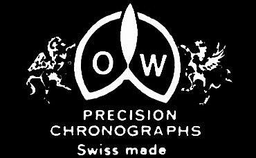 O&W logo